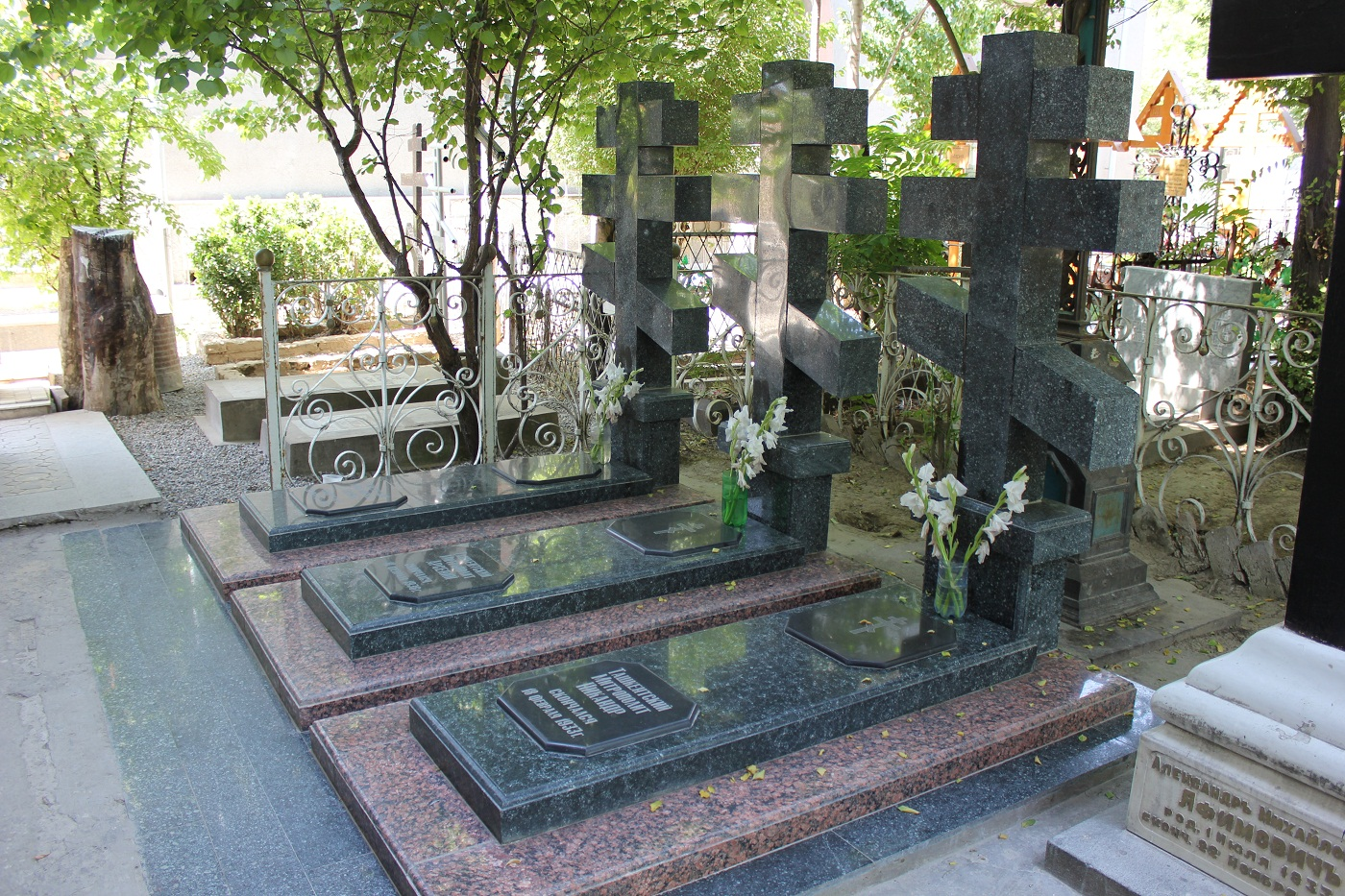 Место захоронения на Боткинском кладбище г. Ташкента (Узбекистан) трех архиереев Митрополита Никандра, Митрополита Арсения и Архиепископа Гавриила.